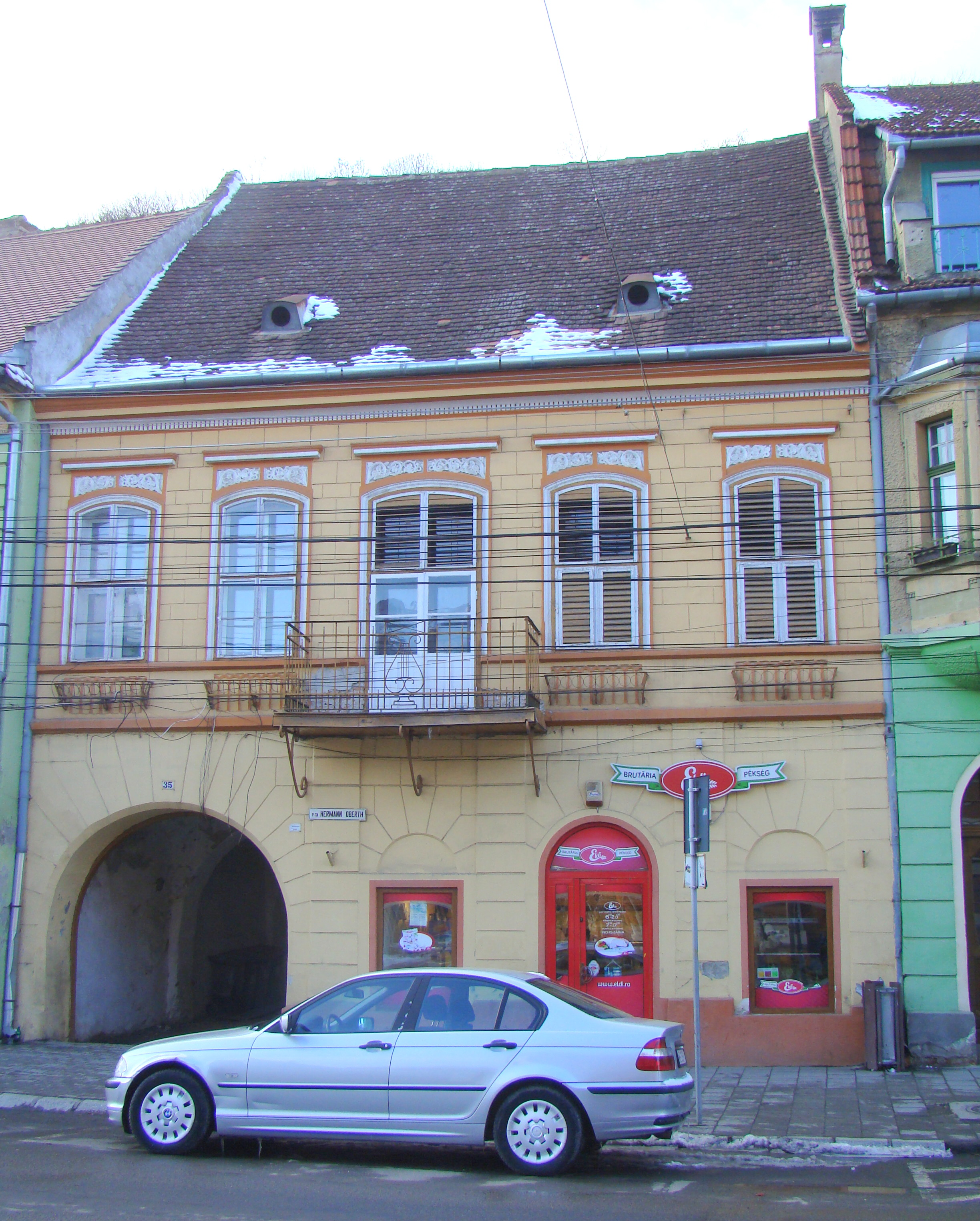 Casă, municipiul Sighișoara, Piața Oberth Hermann 35 sec. XVIII, cca. 1820, sec. XX